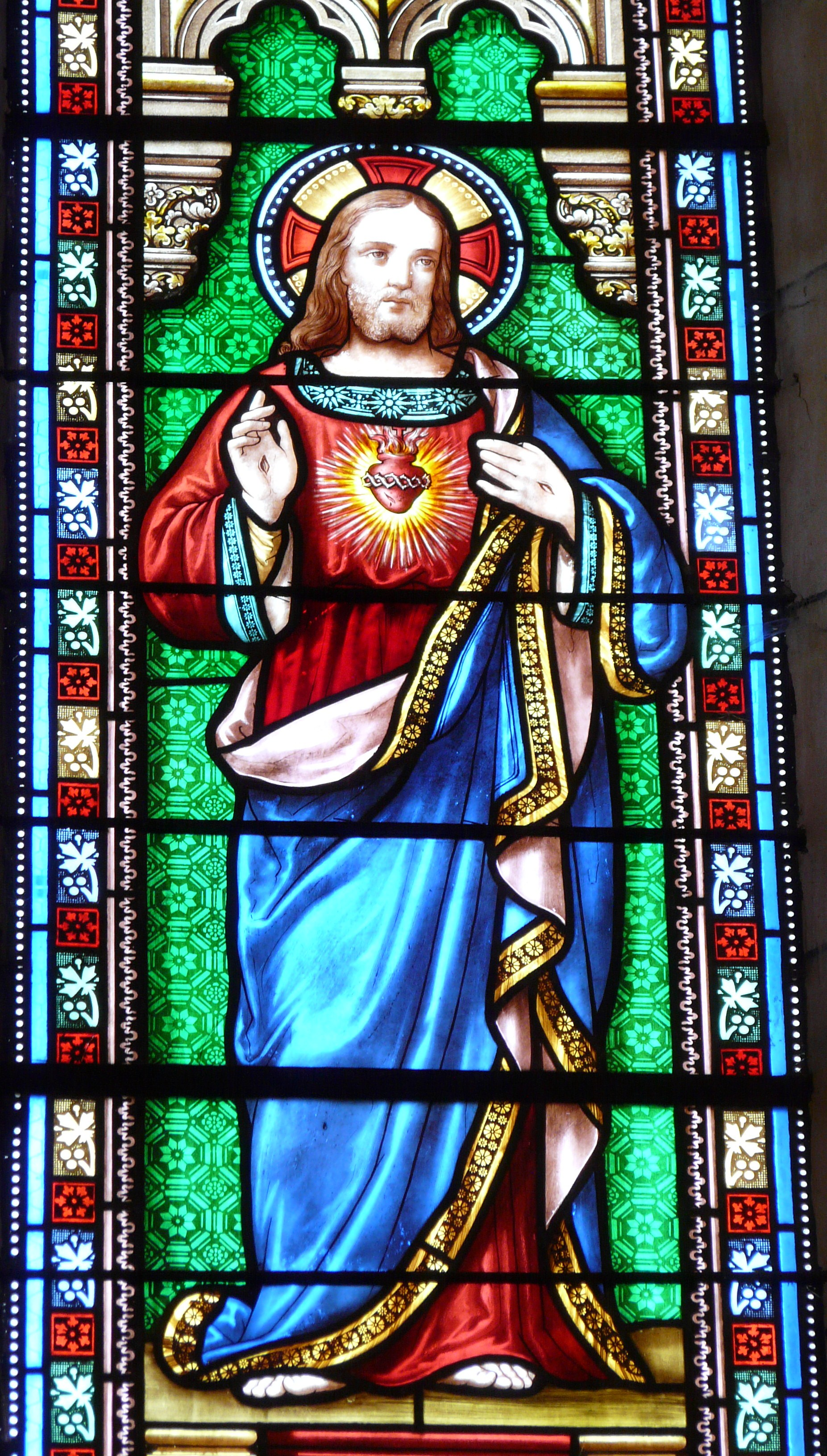 Représentation du Sacré-Cœur de Jésus, détail d'un vitrail de l'église Saint-Pierre-ès-Liens, Dussac, Dordogne, France.